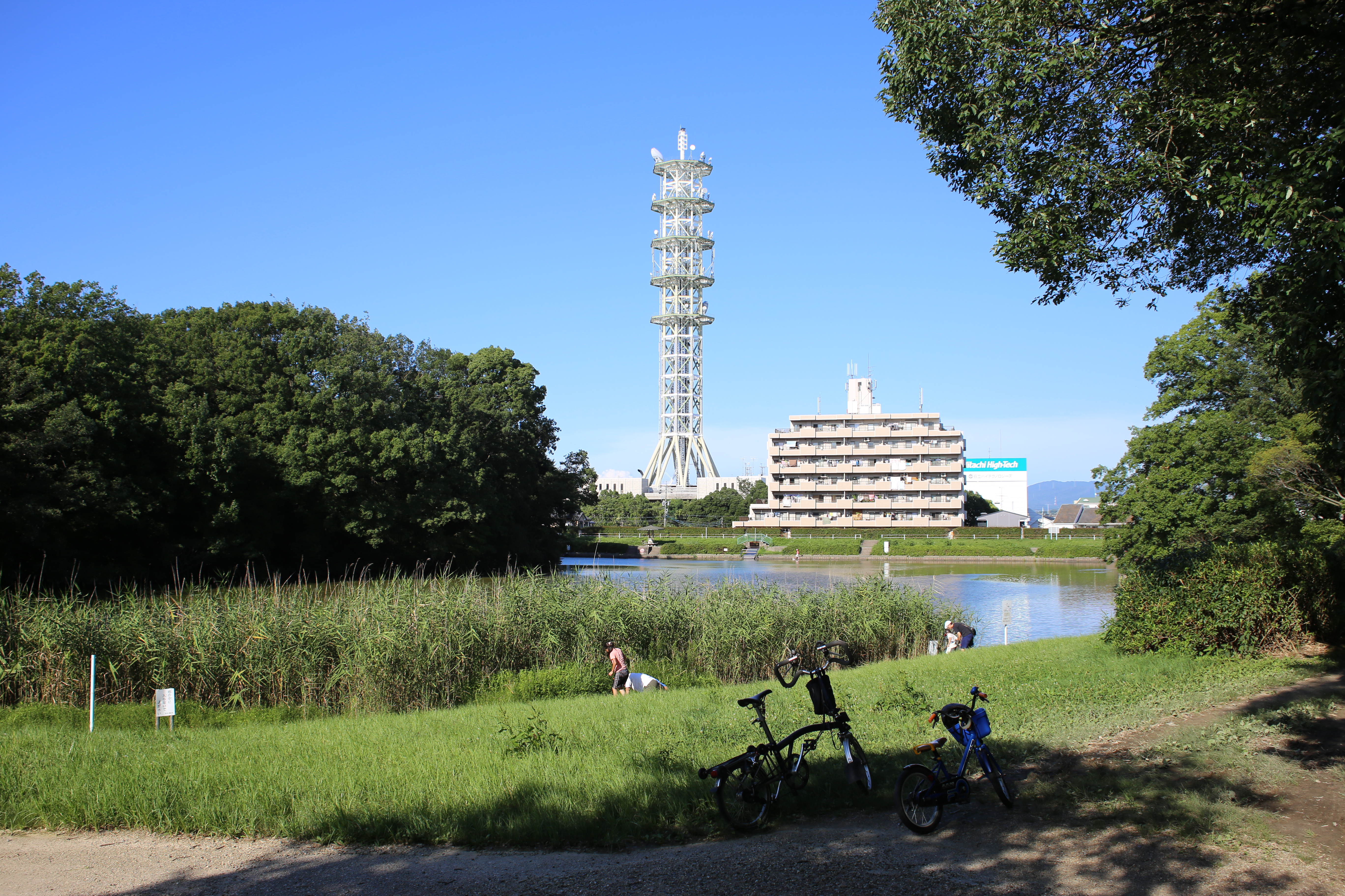 名古屋市名東区の明徳公園内の様子。明徳池を南西から写す